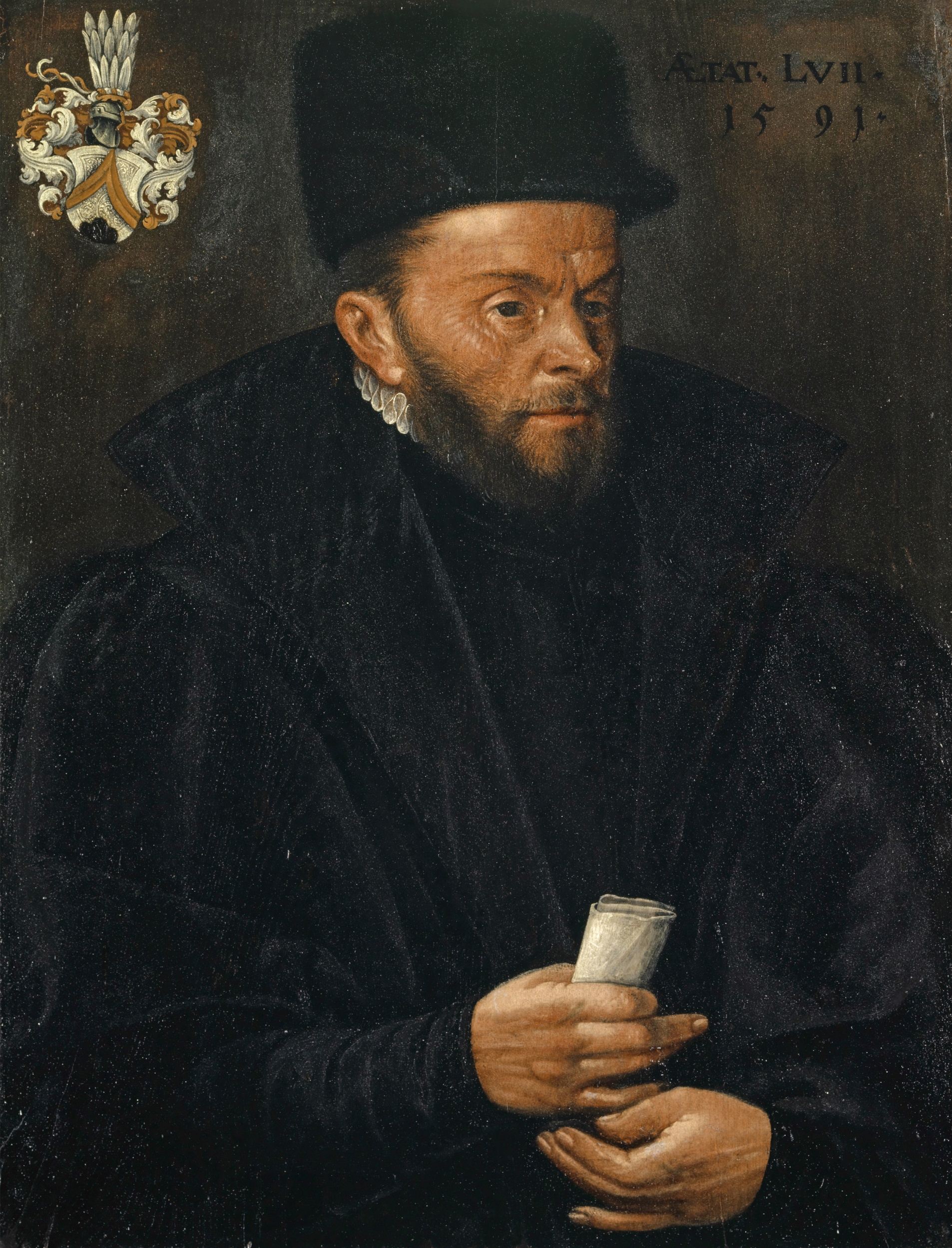 Hans Bock d.Ä.: Bildnis des Basilius Amerbach, 1591. HxB: 65 x 50 cm; Öl auf Eichenholz. Kunstmuseum Basel, Inv. 1876